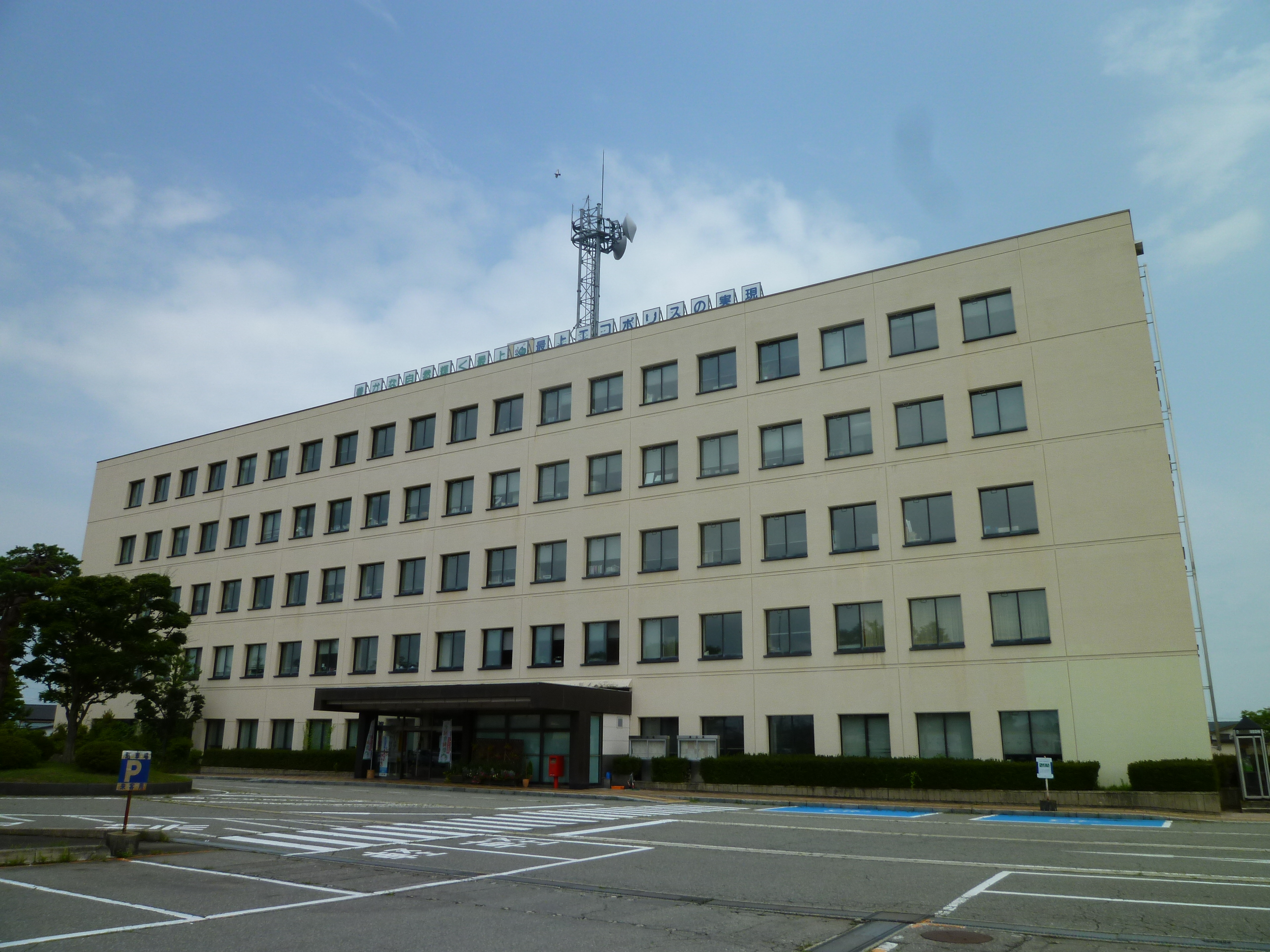 山形県最上総合支庁。 山形県新庄市金沢に所在。